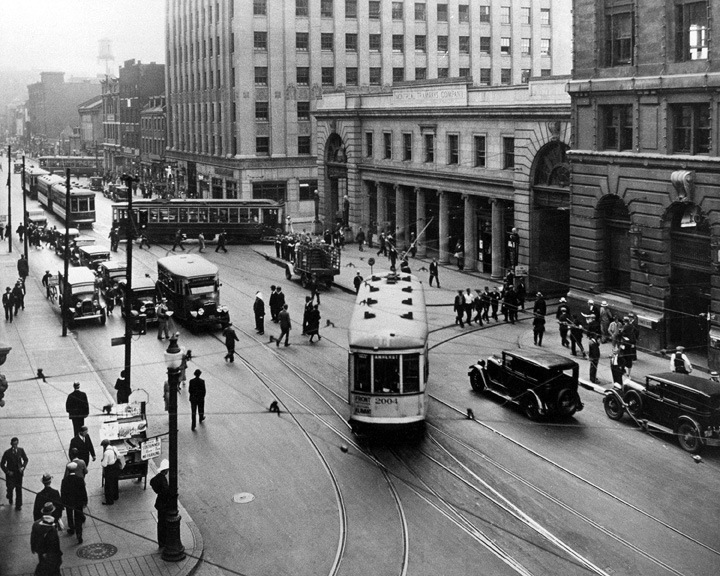 Terminus Craig sur la rue Saint-Antoine Ouest (inauguré en 1925) et bureaux de la Montreal Tramway Company (inaugurés en 1929).